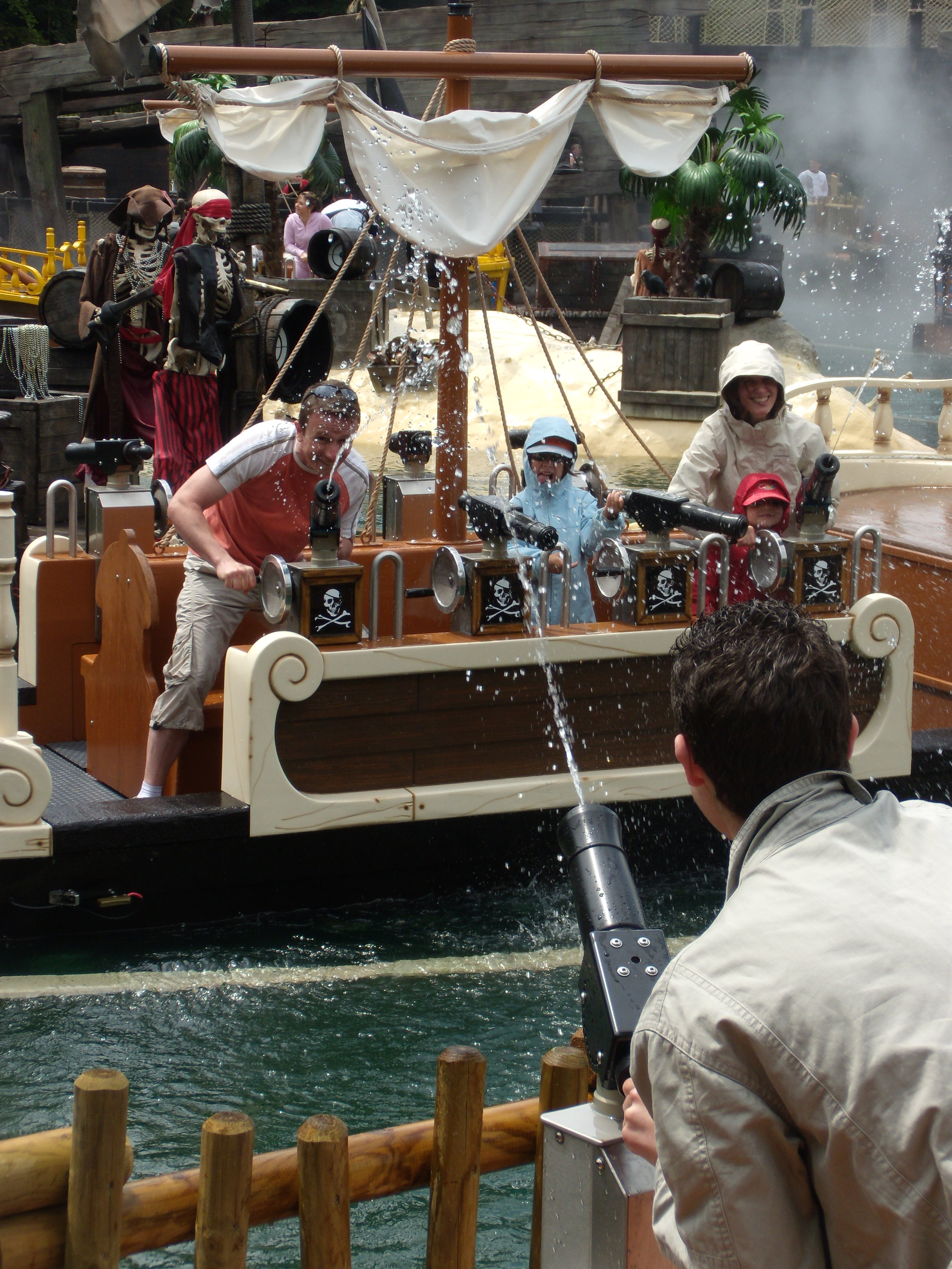 Splash battle Mack du parc d'attractions français Fraispertuis-City, ouvert en 2009.